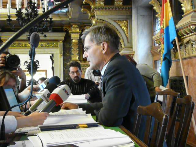 Demszky Gábor, Budapest főpolgármestere nyilatkozik a sajtónak a Fővárosi Önkormányzat testületi ülésének szünetében. A közgyűlés várja a határozatképességet. Az MSZP képviselői nem jelentek meg.